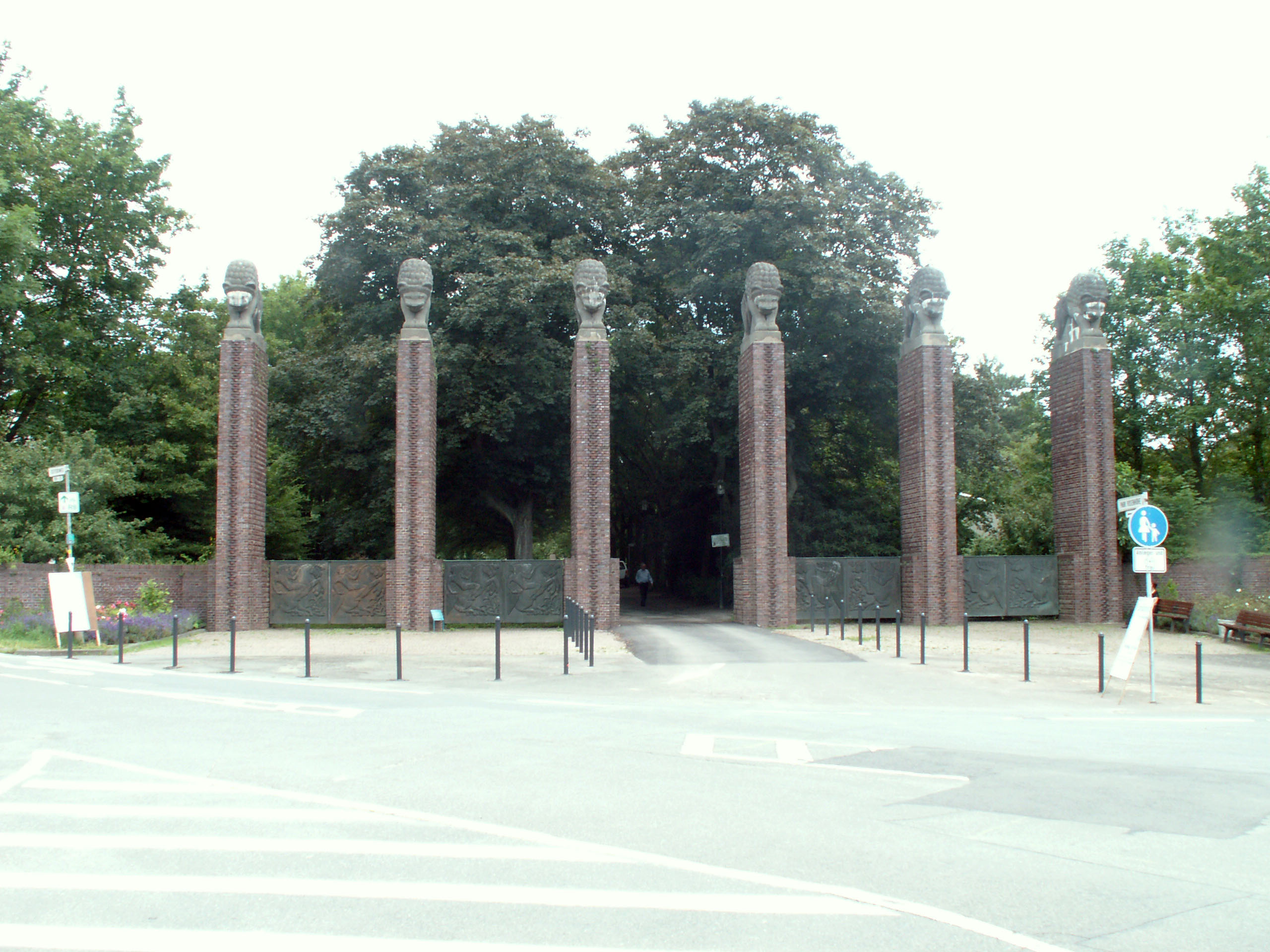 Aufgenommen auf einer Wanderung von der Darmstädter Rosenhöhe zum Steinbrücker Teich und dem Oberwaldhaus.. Näheres zur Route findet sich auf der Webseite froutes Wanderung Rosenhöhe Oberwaldhaus.